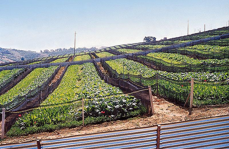 vista panoramica di allevamento elicicolo